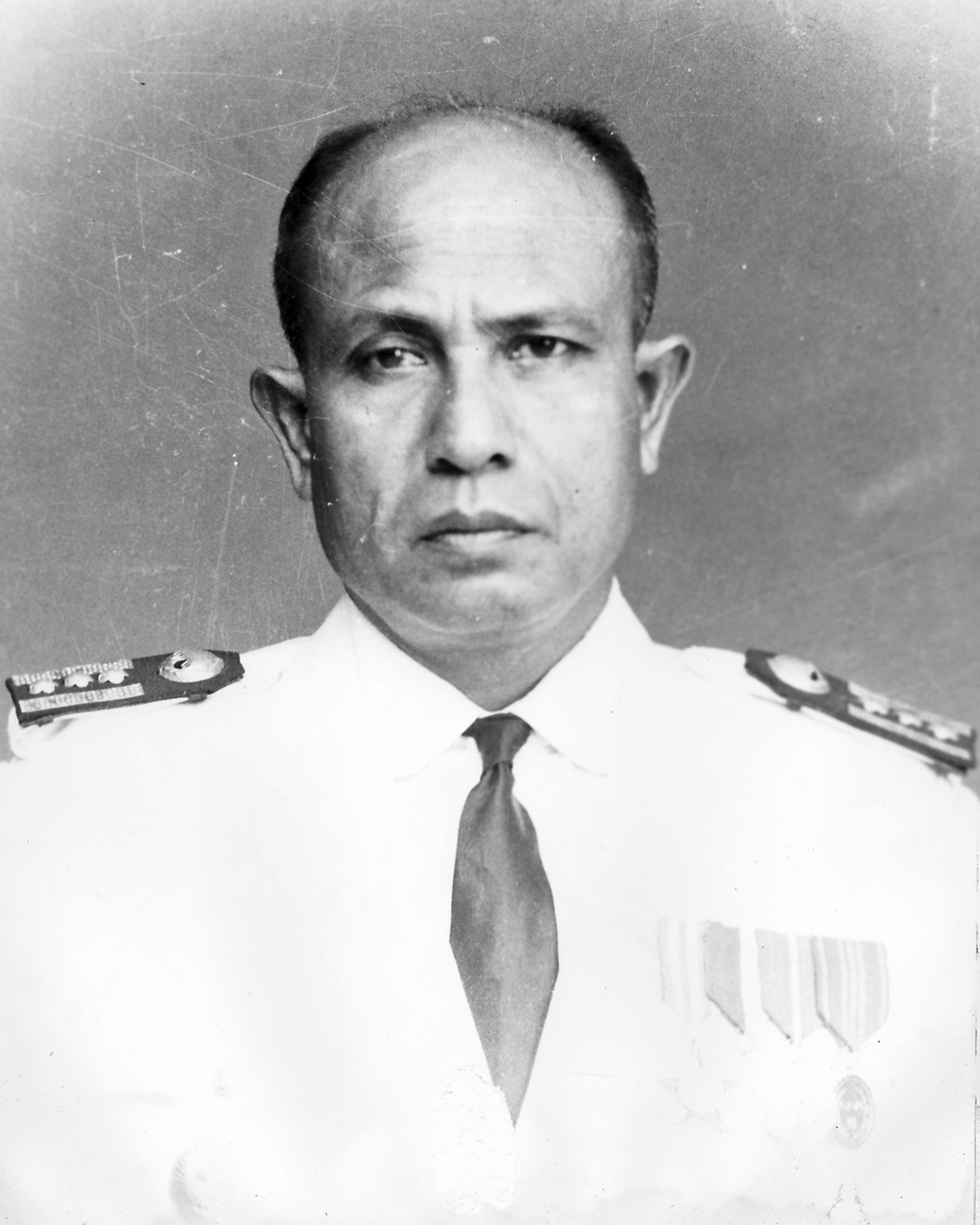 Ini merupakan foto dari Tgk. Abdul Wahab Dahlawy yang merupakan dokumentasi dari keluarga besar beliau